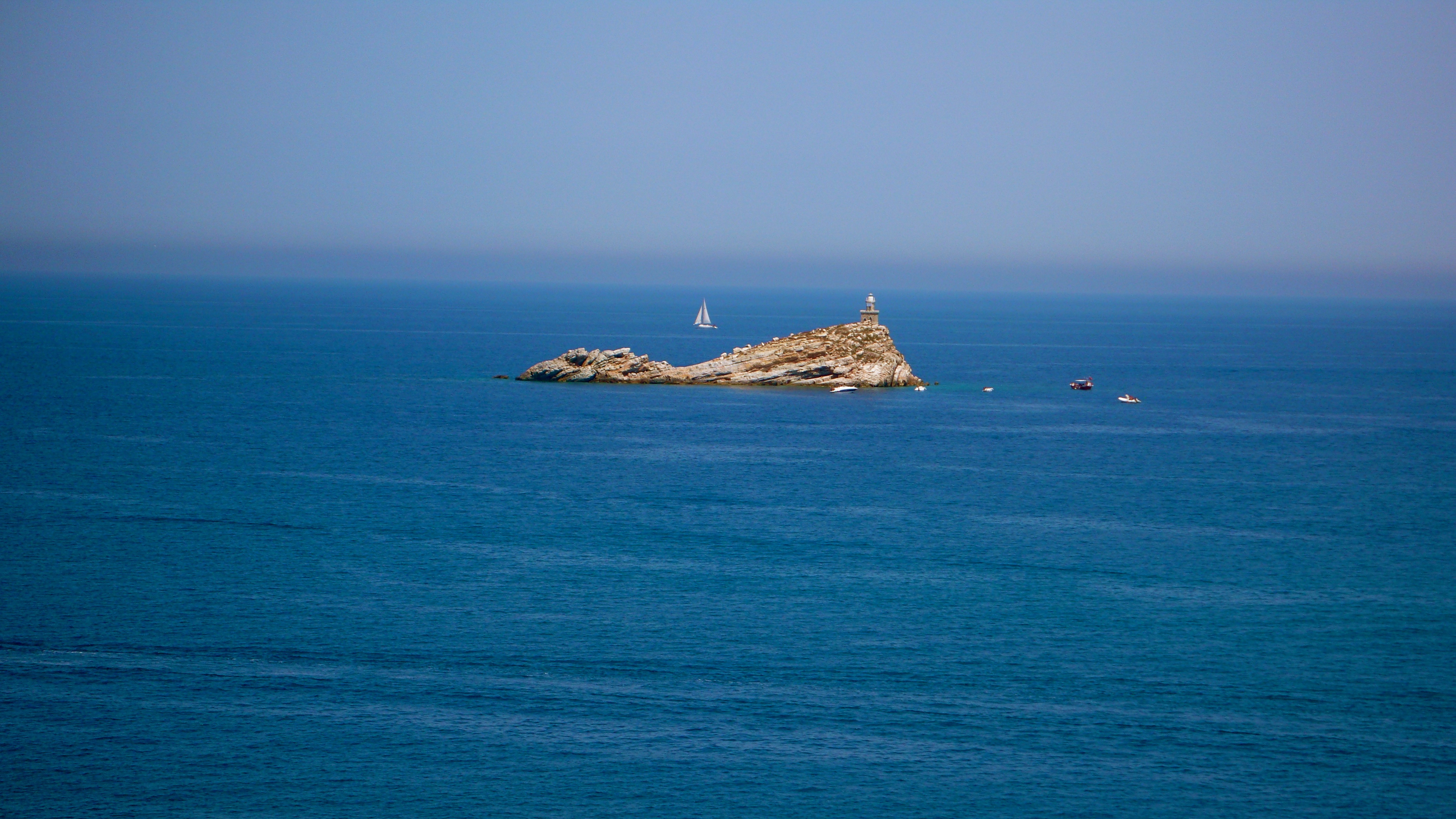 Portoferraio